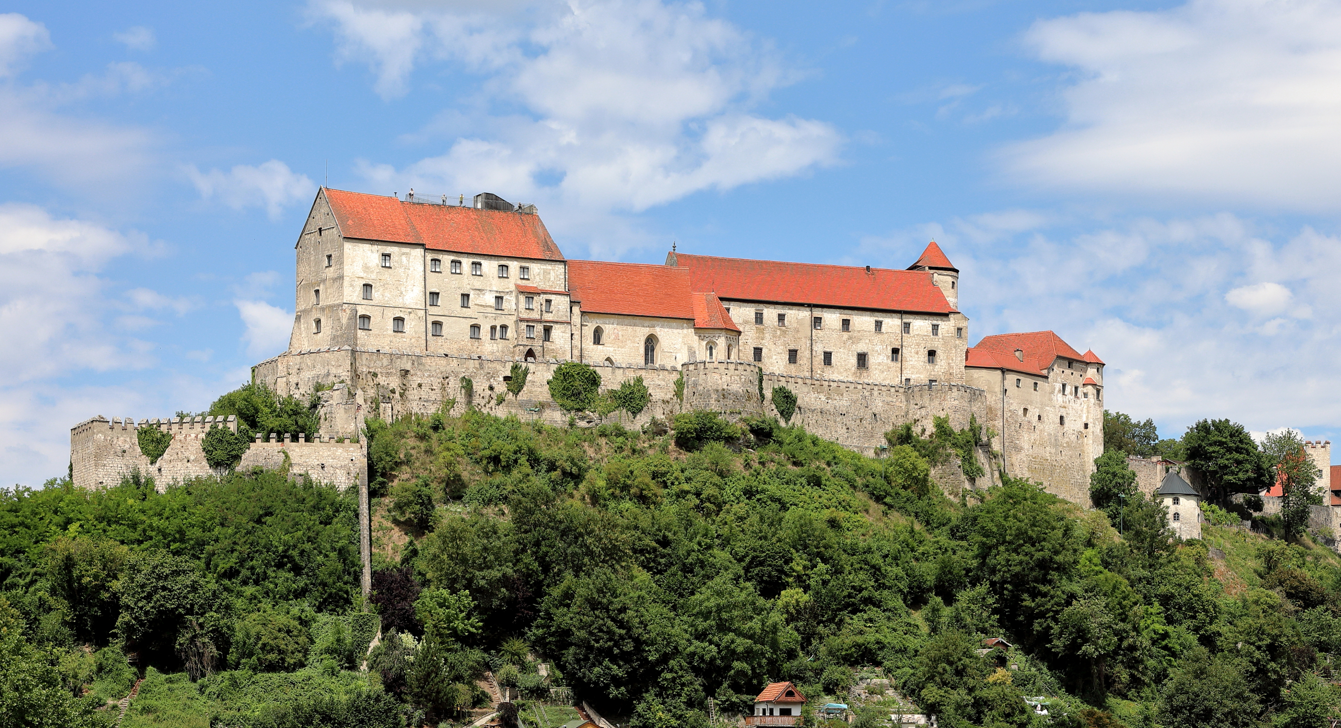 Südansicht der Hauptburg in der deutschen Herzogstadt Burghausen im oberbayerischen Landkreis Altötting.